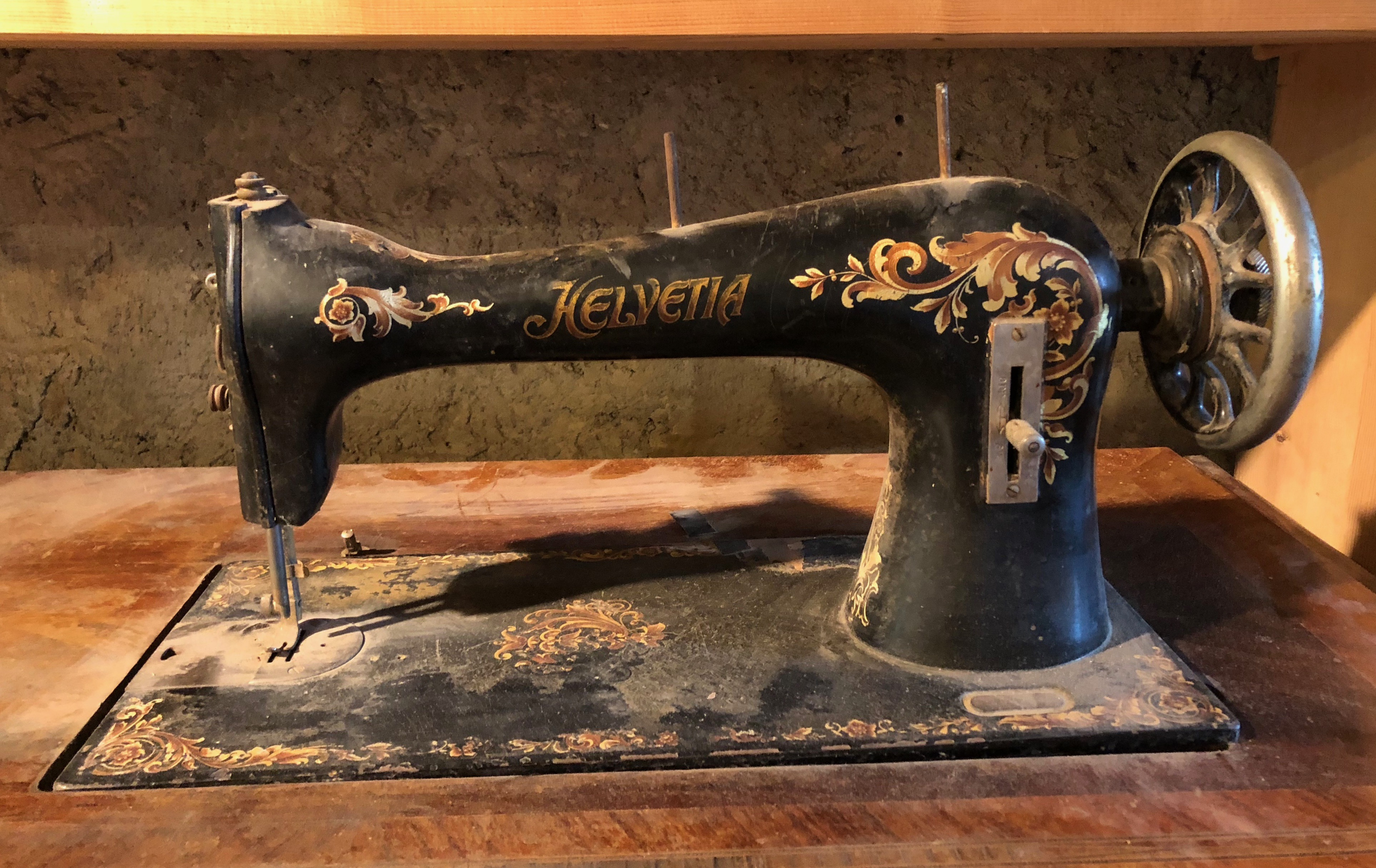 Modell der Nähmaschinenfabrik Helvetia